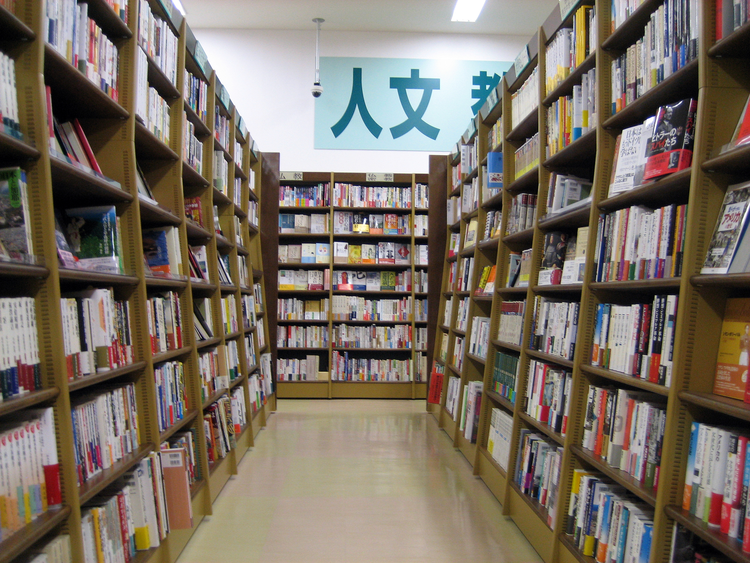 日本にある書店の店内。